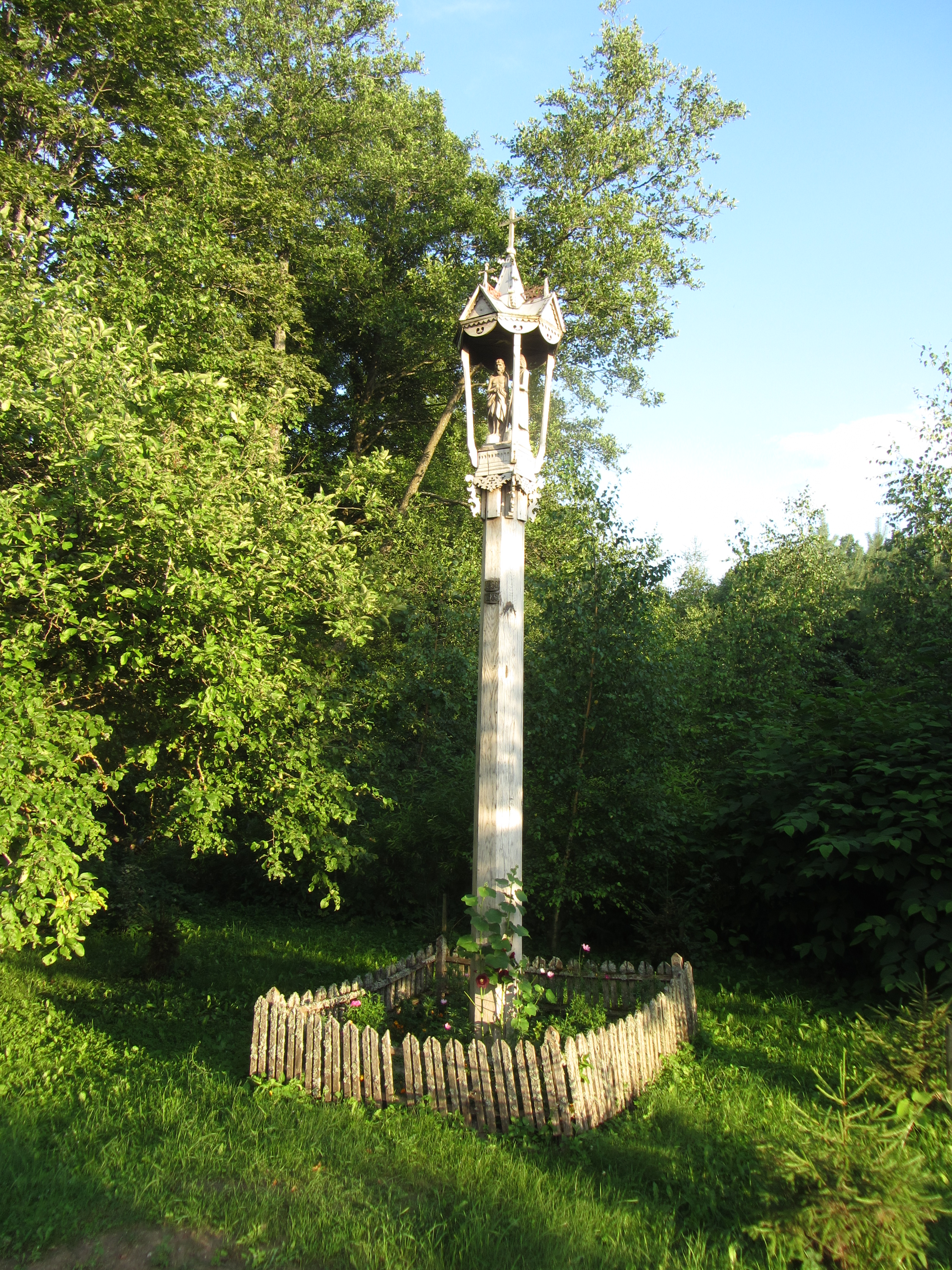 Sudeikių sen., Lithuania